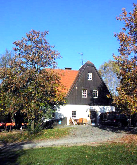 Tauritzmühle near Speichersdorf (Landkreis Bayreuth, Upper Franconia)